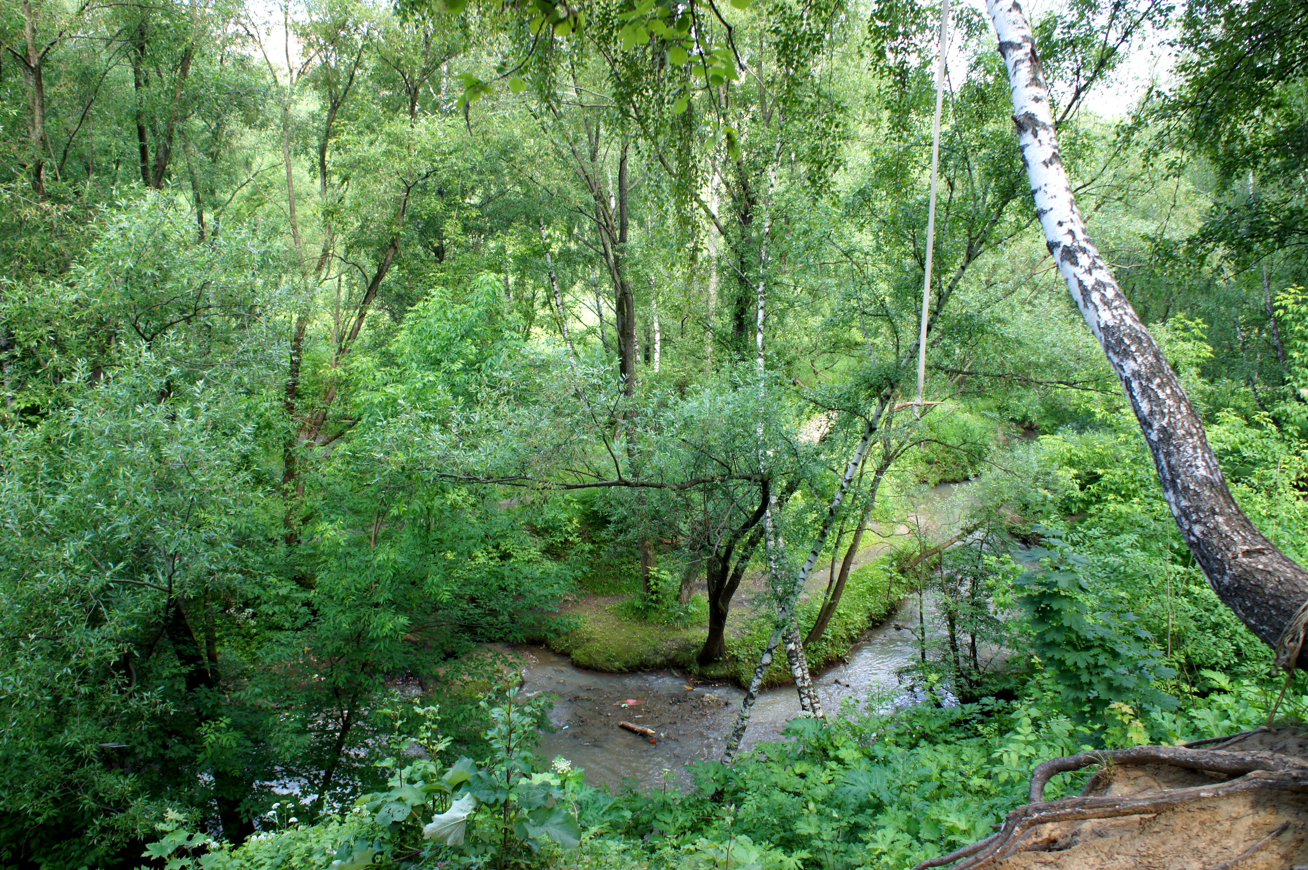 Река Котловка на выходе из коллектора.